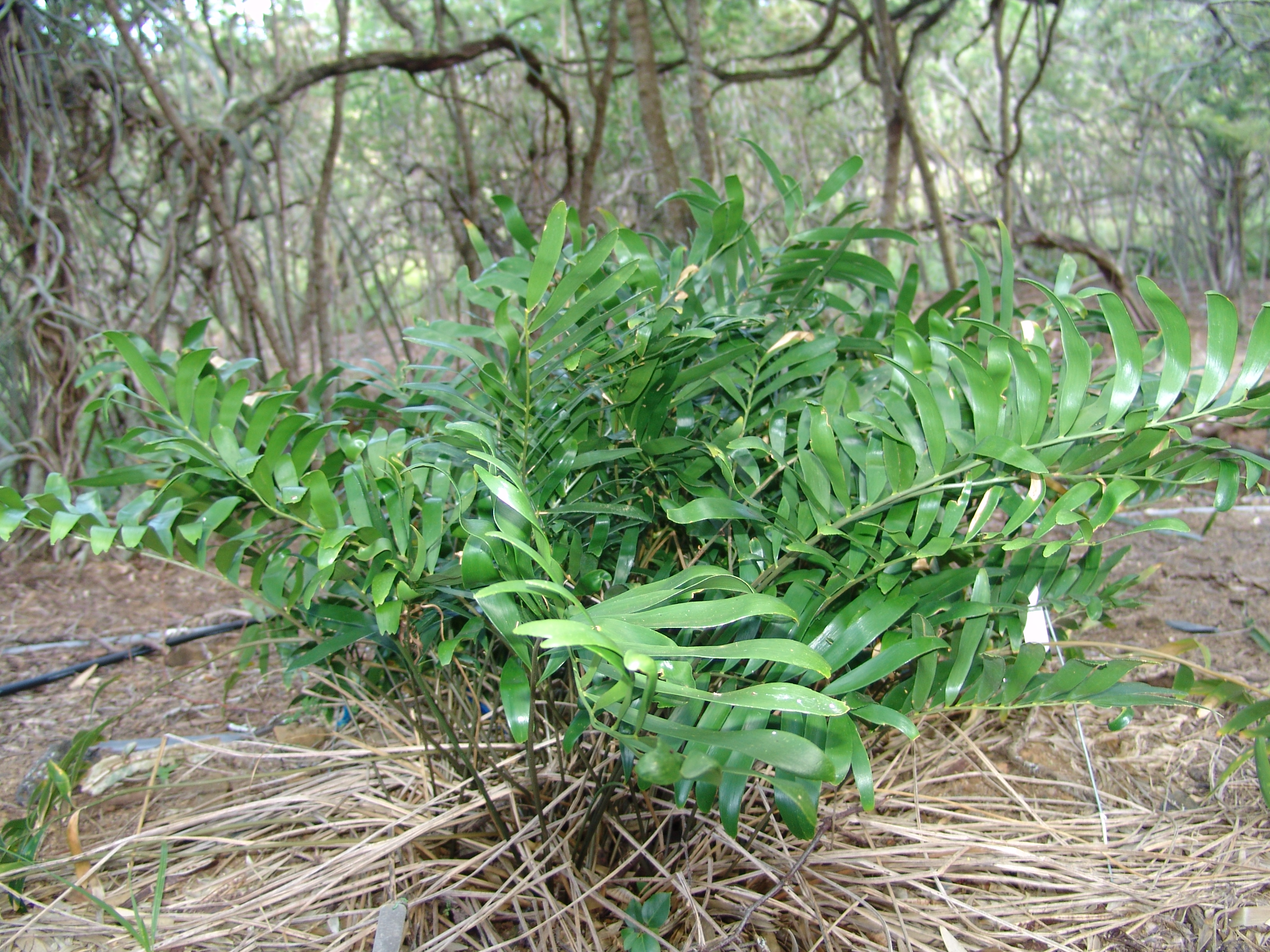 Koko Crater Botanical Garden Oahu Hawaii